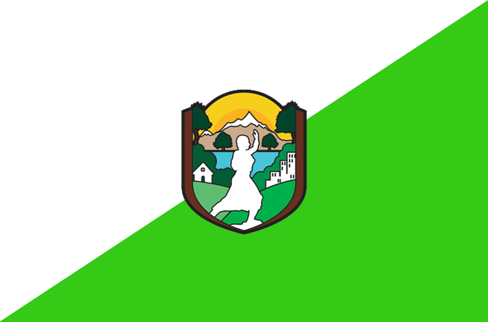 Tamburco, Abancay, Apurímac